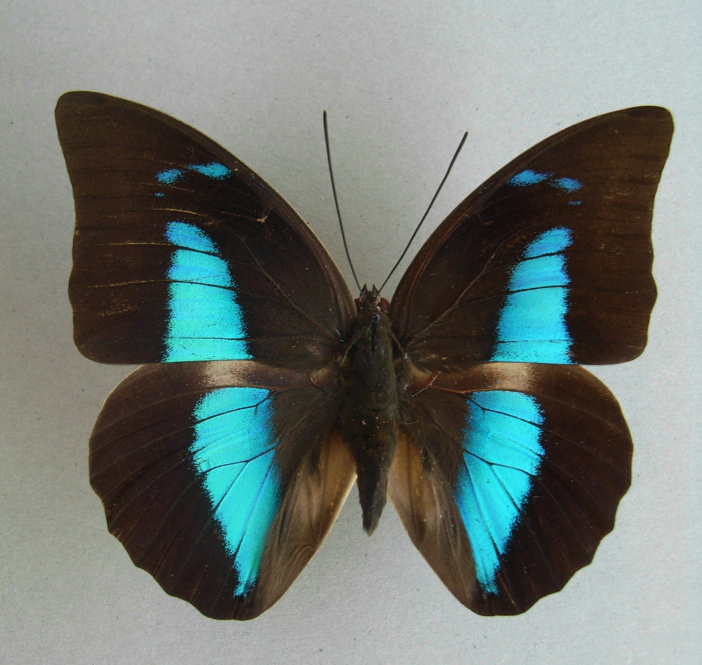 Archaeoprepona demophon (Linnaeus, 1758)